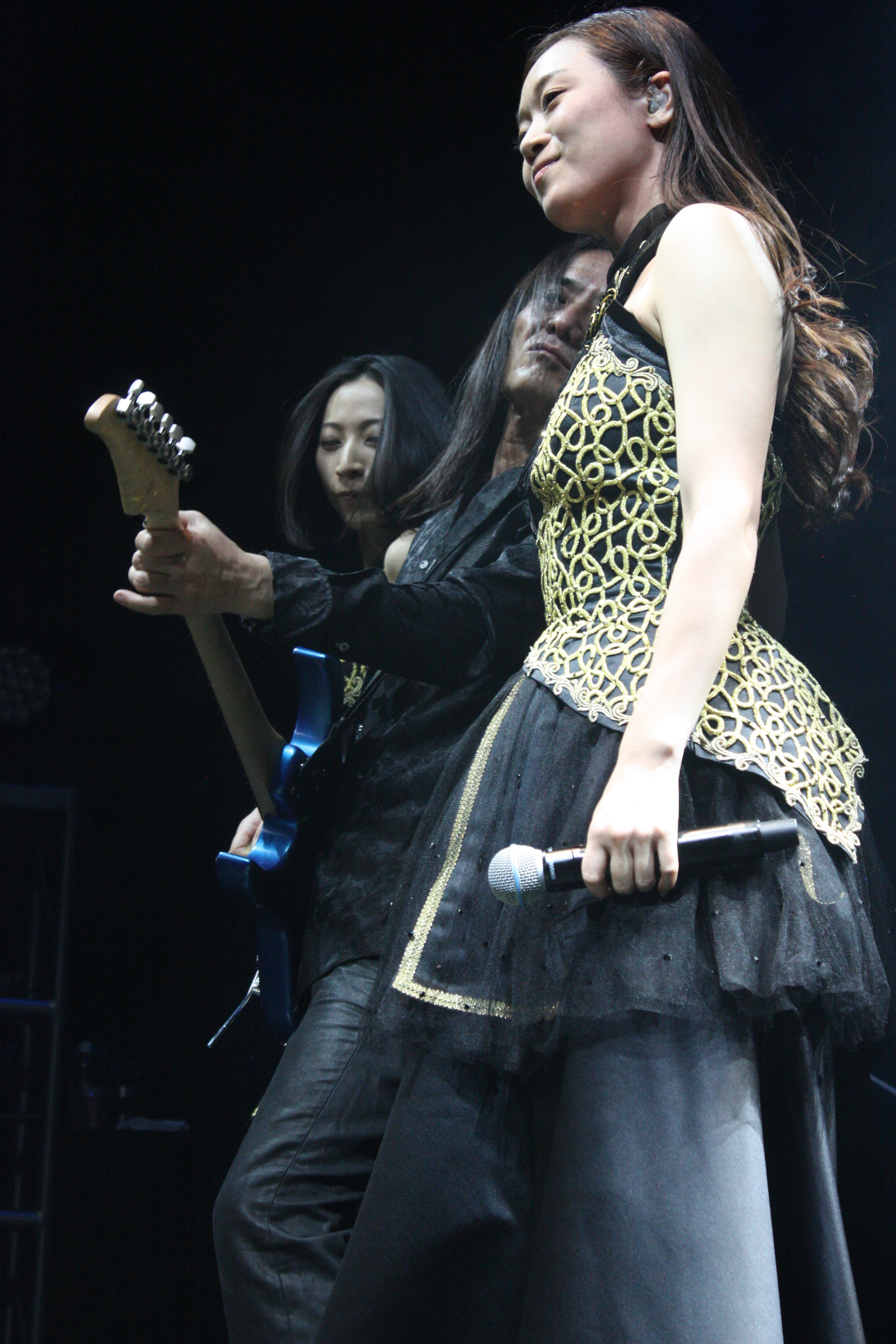 El grupo japonés Kalafina integrado por Hikaru, Keiko y Wakana, presentándose en el Plaza Condesa de la Ciudad de México el pasado 20 de Febrero.